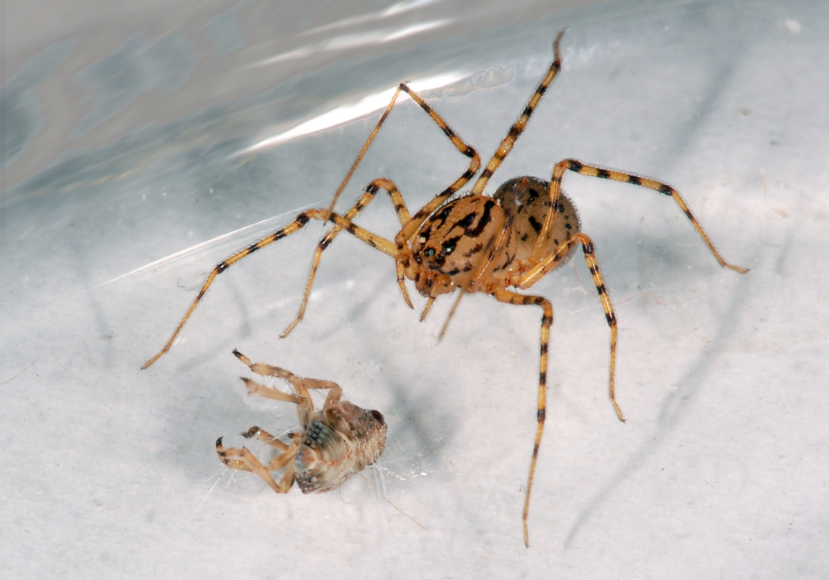 Scytodes thoracica und Zikade, die das ersten und zweite mal mit dem Giftfaden bespritzt wurde, Nied, Frankfurt/Main, Hessen, Deutschland